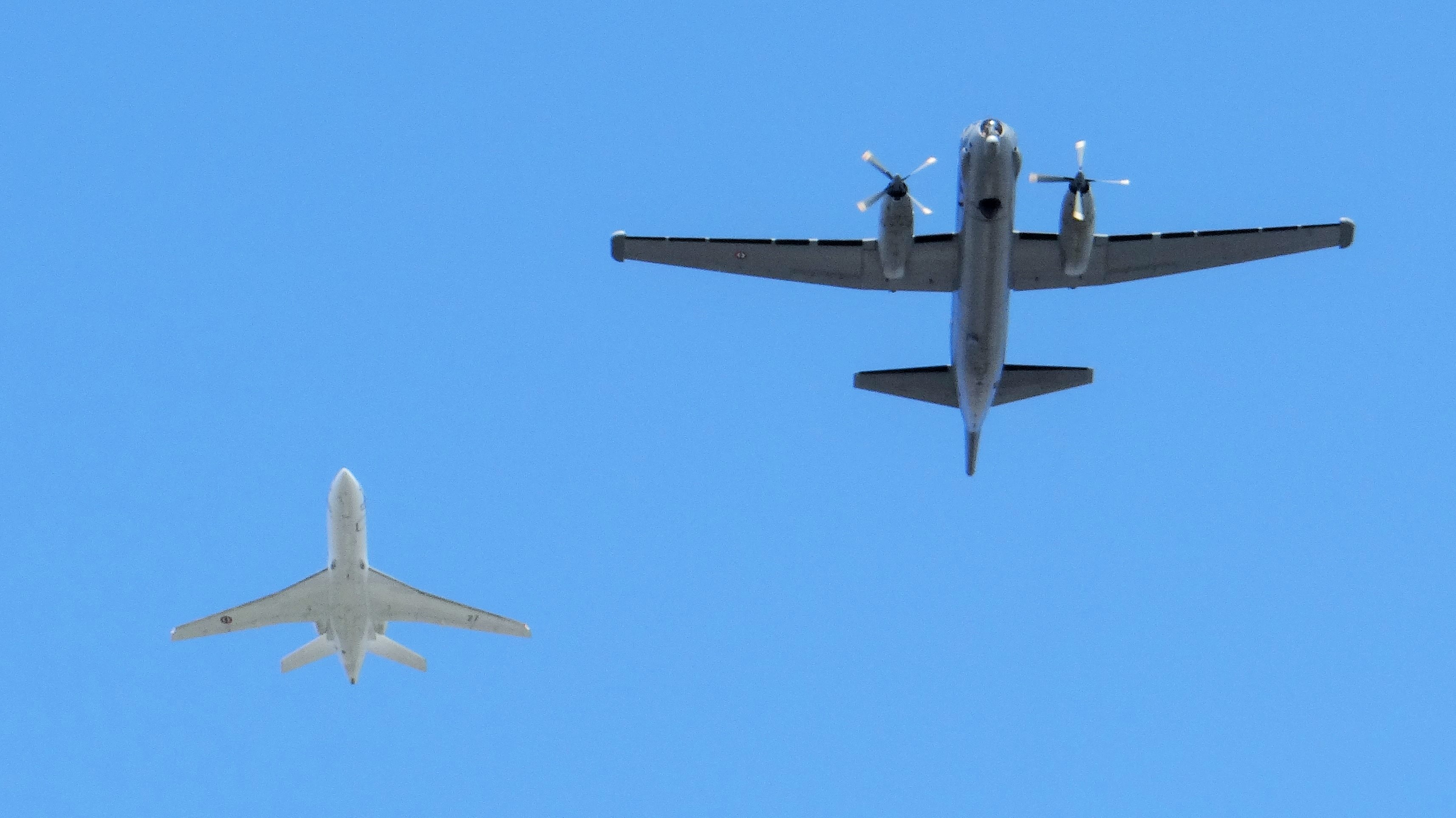 Défilé aérien du 14 juillet 2018 à Paris : 1 ATL2, 1 Falcon 50